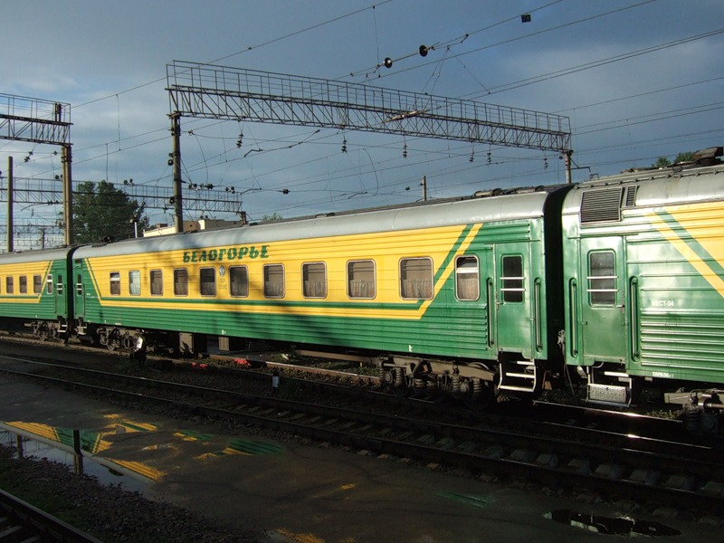 Вагон скорого фирменного поезда «Белогорье».